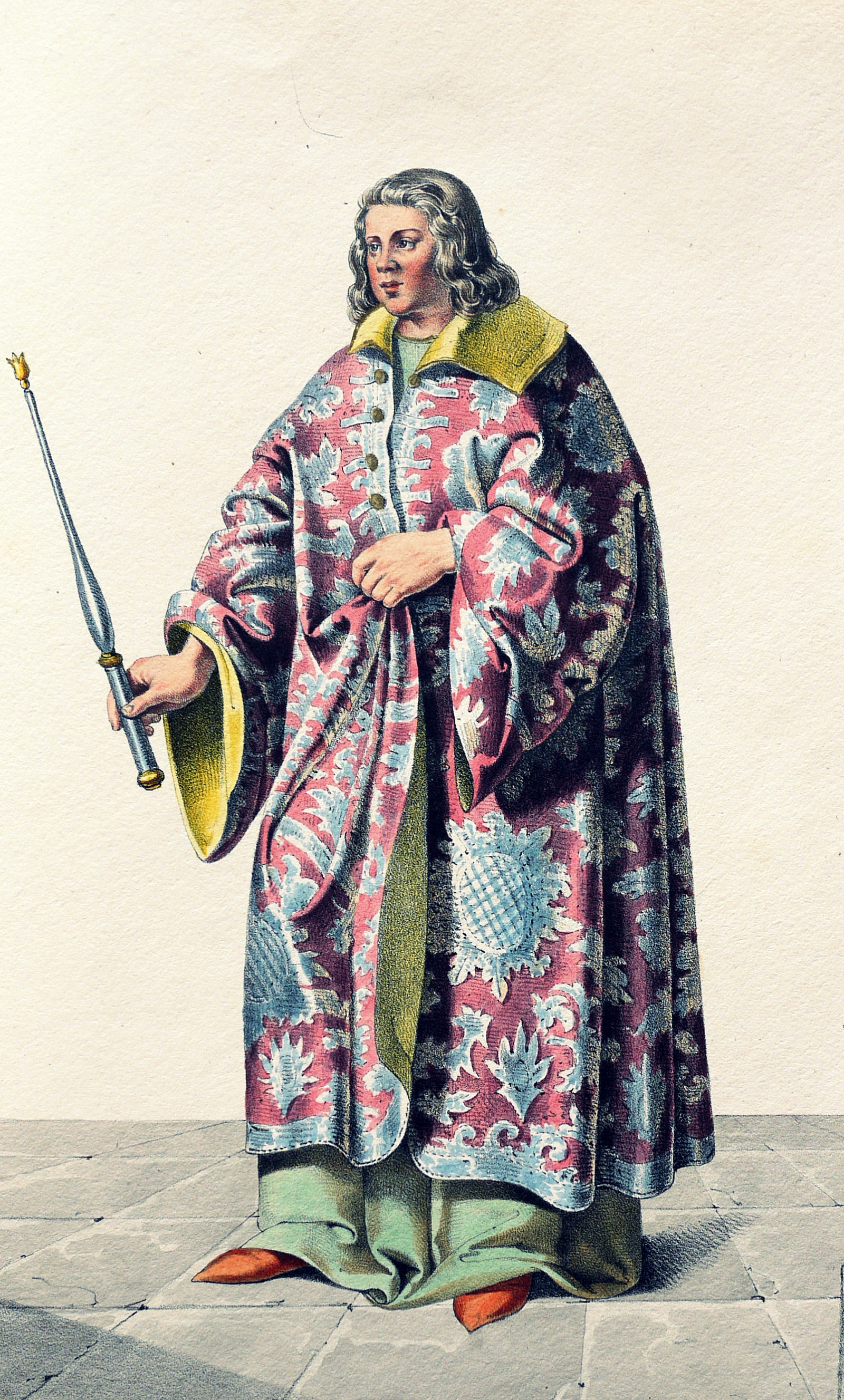 Géza I. (1044-1077), König von Ungarn (1074-1077). Lithographie von Josef Kriehuber nach einer Zeichnung von Moritz von Schwind aus Ungerns Erste Heerführer Herzoge und Koenige In einer Reihe von Bildnissen von Bela bis auf Seine Majestät Franz I. Kaiser Von Österreich König Von Ungern &c., &c. Wien : Lithographisches Institut ;ca. 1828